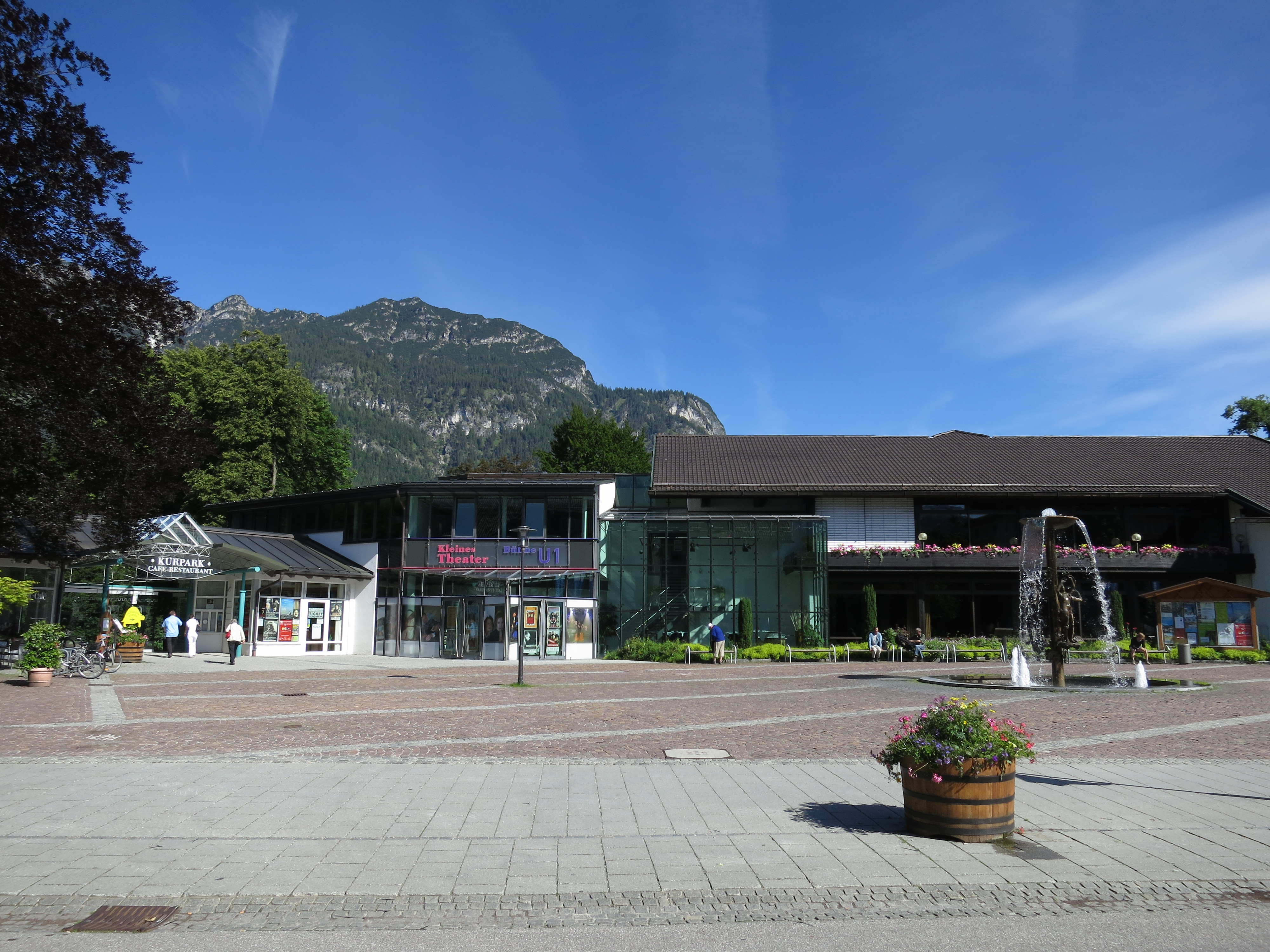 Richard-Strauss-Platz, Garmisch-Partenkirchen